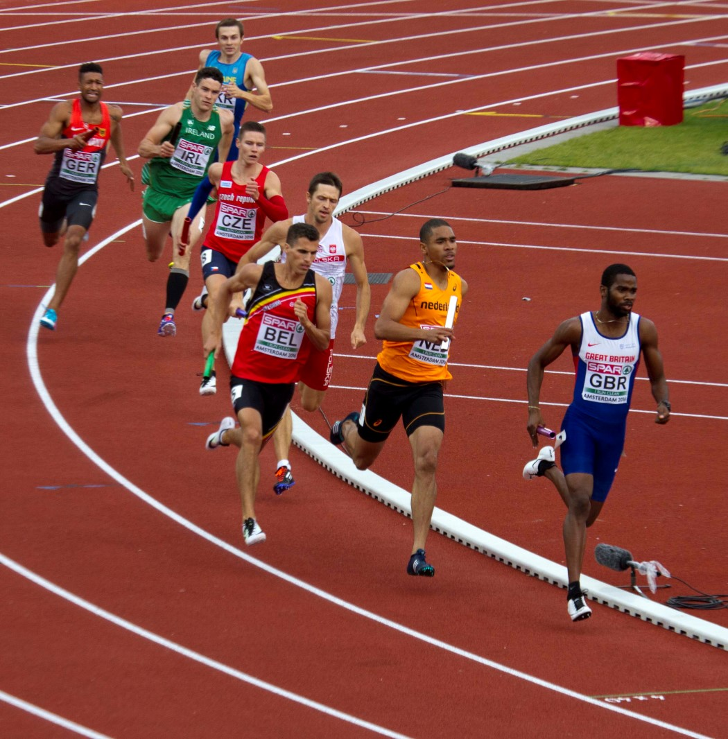 final race / finale